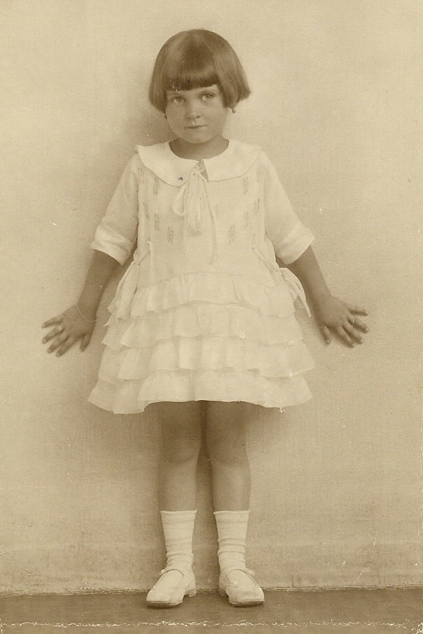 Kleines Mädchen mit Pagenkopf 1922